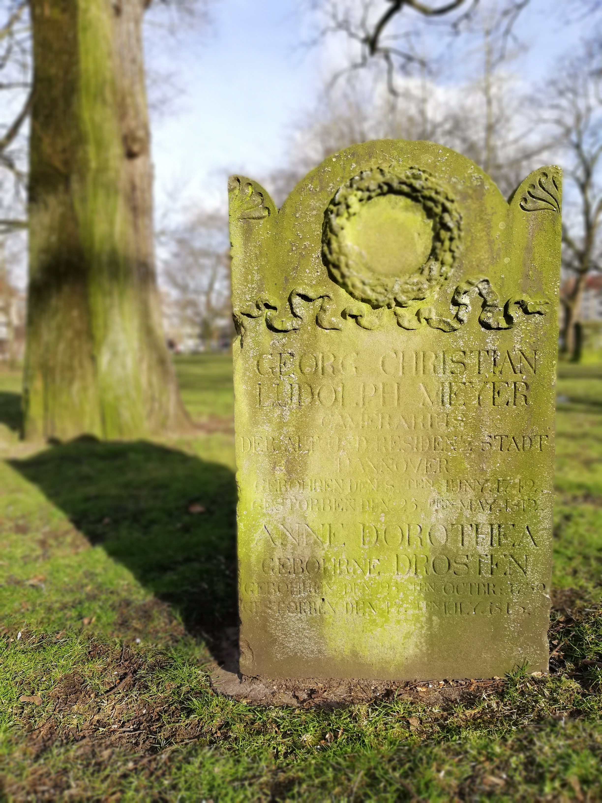 Alter St.-Nikolai-Friedhof in Hannover, Grabmal des Cammerarius (Kämmerer) der Alt- und Residenzstadt Hannover „Georg Christian Ludolph Meyer“ geboren den 8. Juni 1772, gestorben den 25. Mai 1812, und der „Anne Dorothea, geborene Drosten“ geboren den 25. Oktober 1759, gestorben den 17. Juli 181? ...